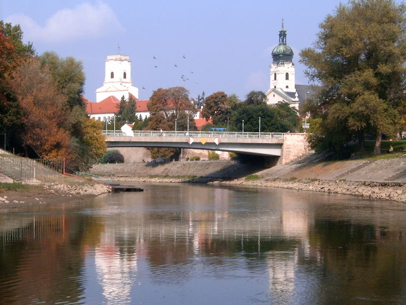 A Rába kettős híd, saját kép